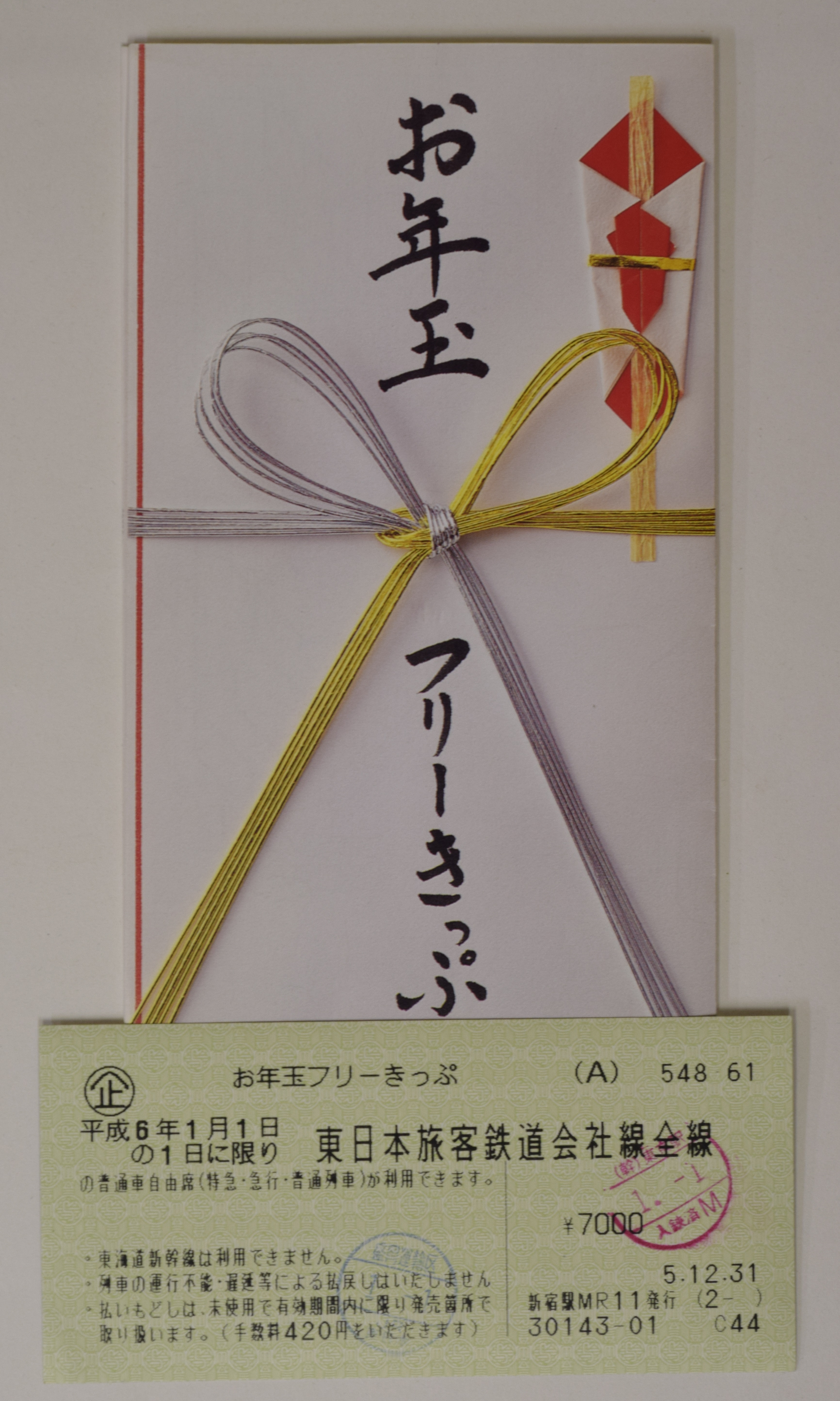 JR東日本の元日のみ有効の乗り放題切符・お年玉フリーきっぷ 熨斗袋デザインの専用チケットホルダーも付いていた